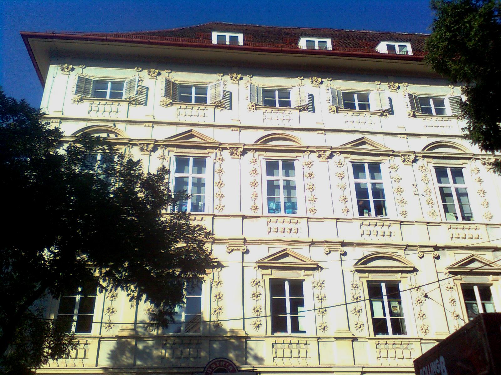 Fassade der Grazer Palais Welsersheimb